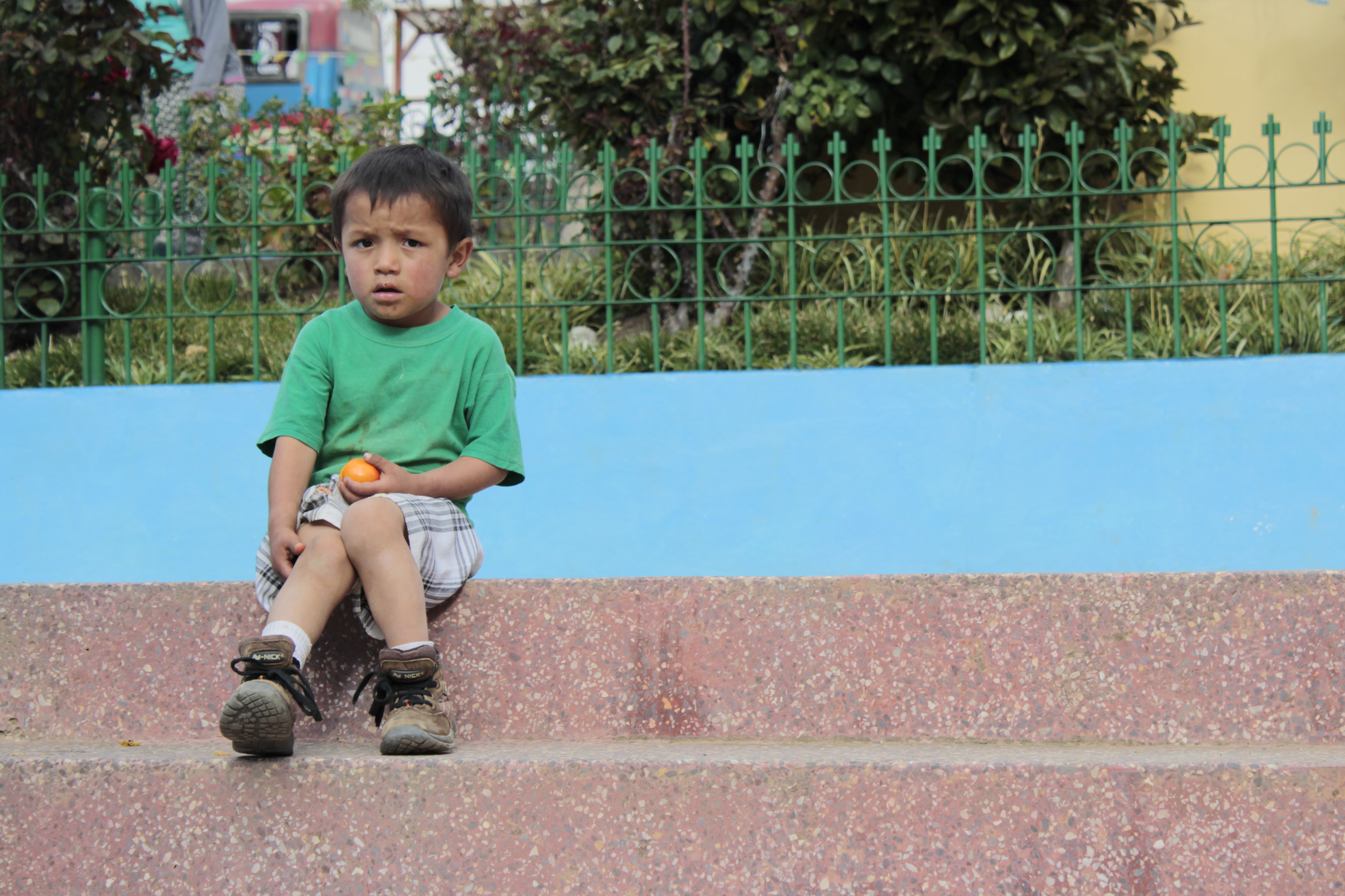 En la plaza de armas del distrito de Rapayan.